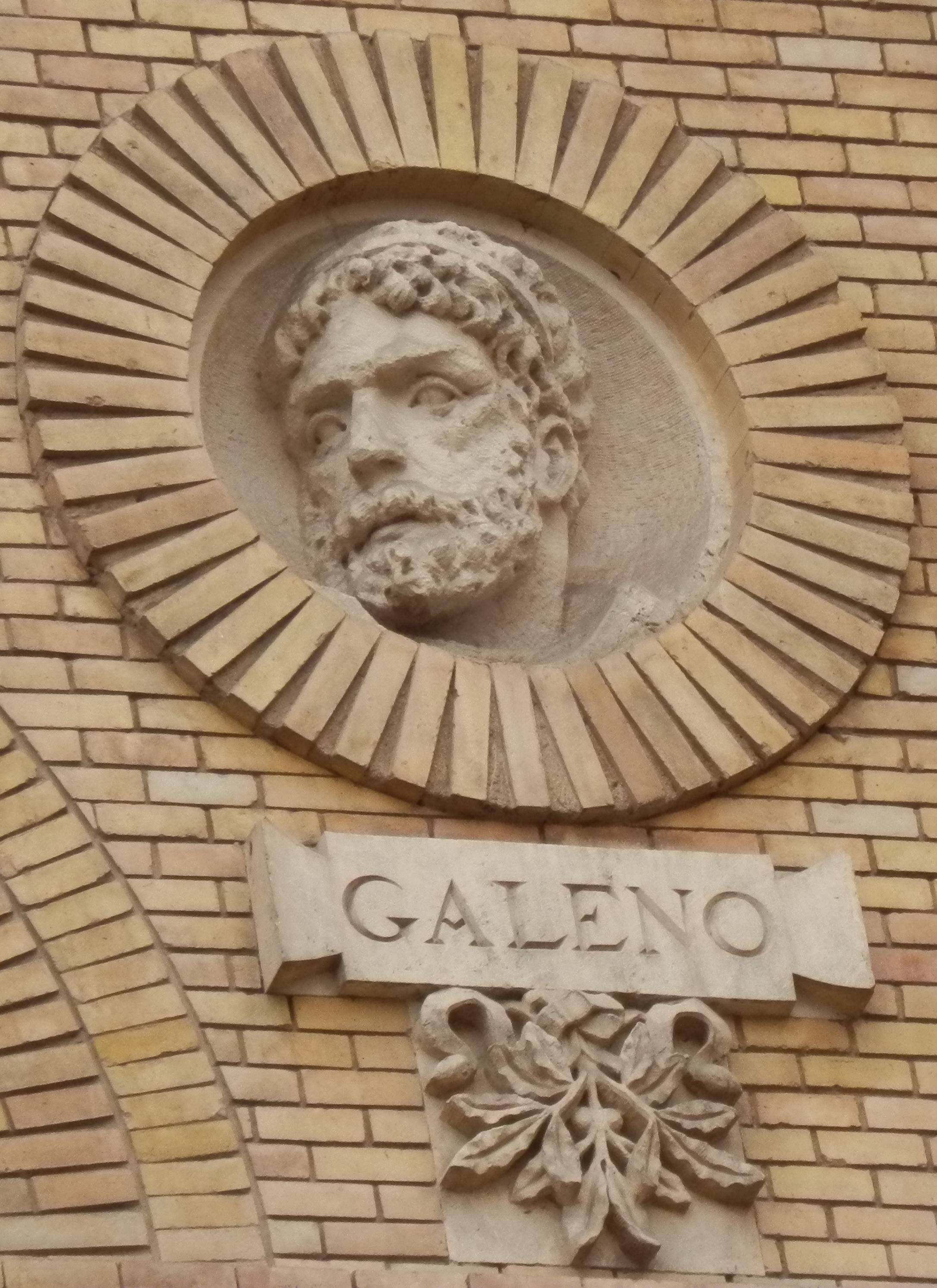 Estatua dedicada a Galeno en el Paraninfo de la Universidad de Zaragoza (Antigua Facultad de Medicina).